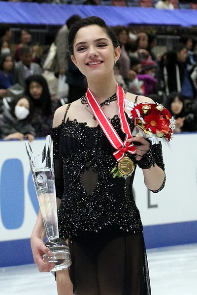 Евгения Медведева на церемонии награждения в финале Гран-при 2017-2018